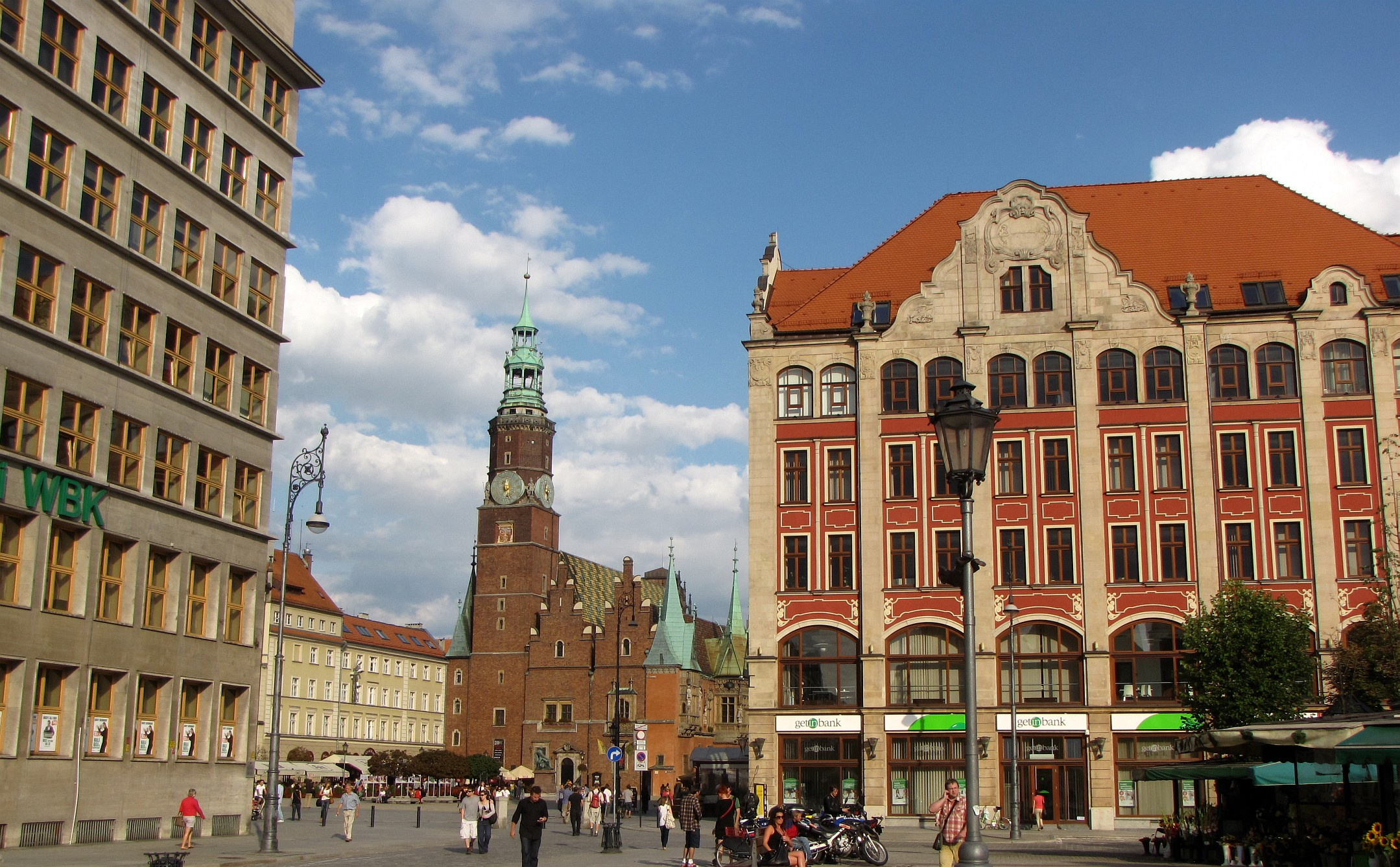 ratusz we Wrocławiu i kamienica narożna plac Solny 20/Rynek 12